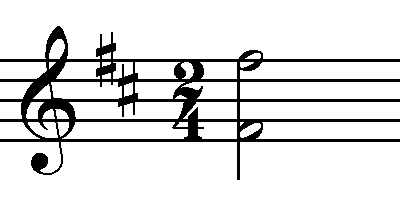 zenei módosítójelek - példák